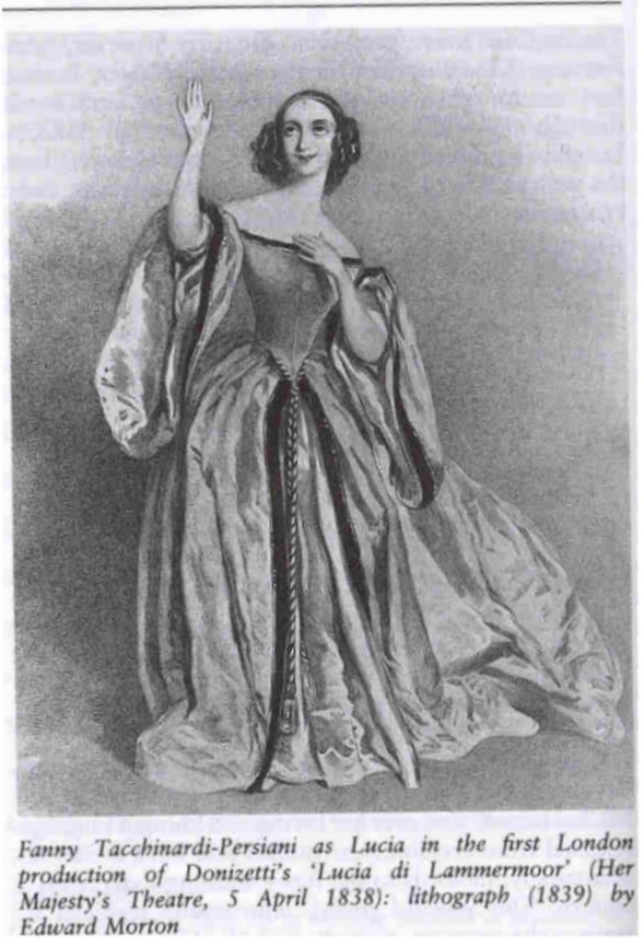 Eerste zangeres Lucia di Lammermoor